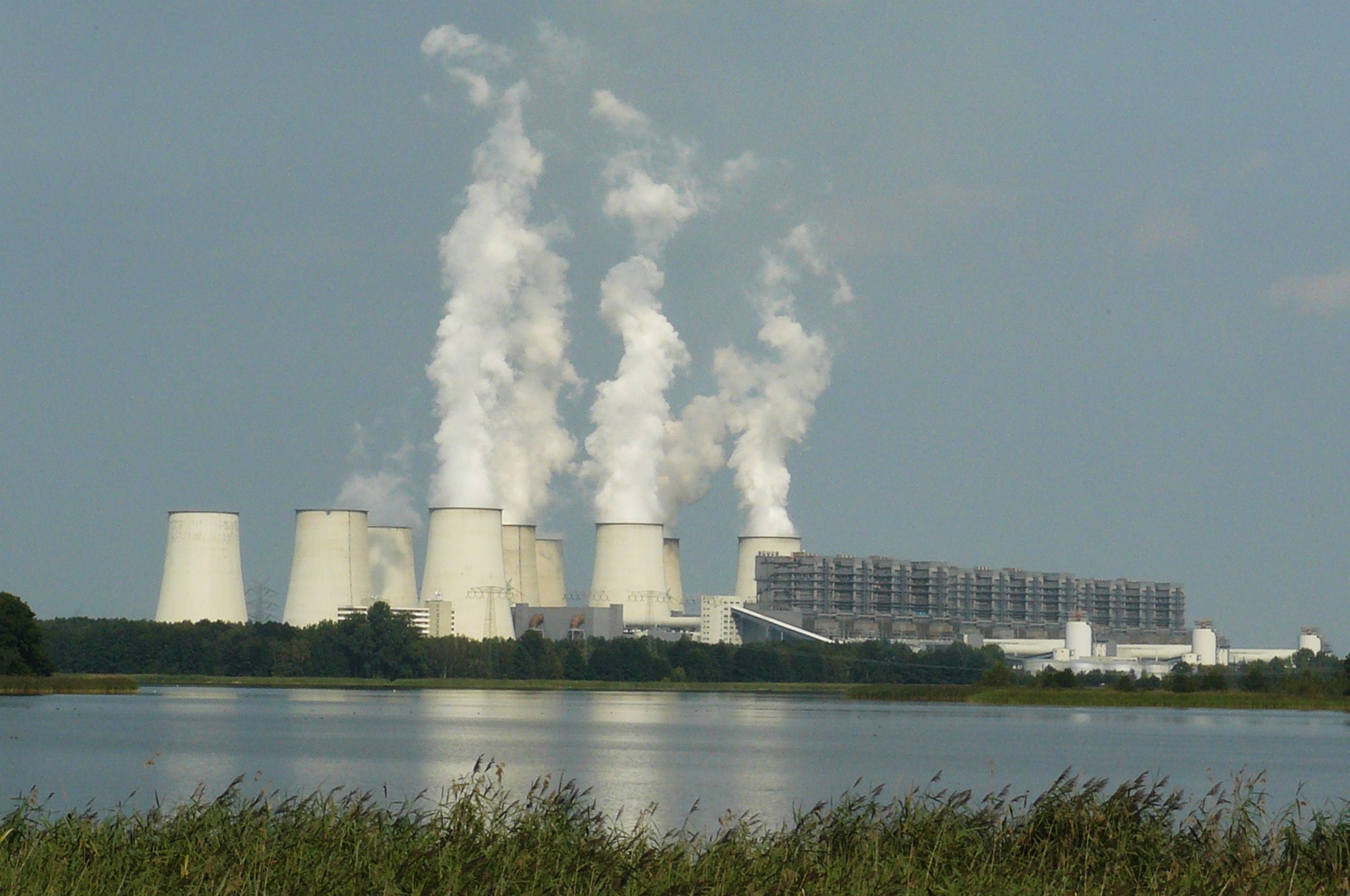 Stawy rybne w Peitz.